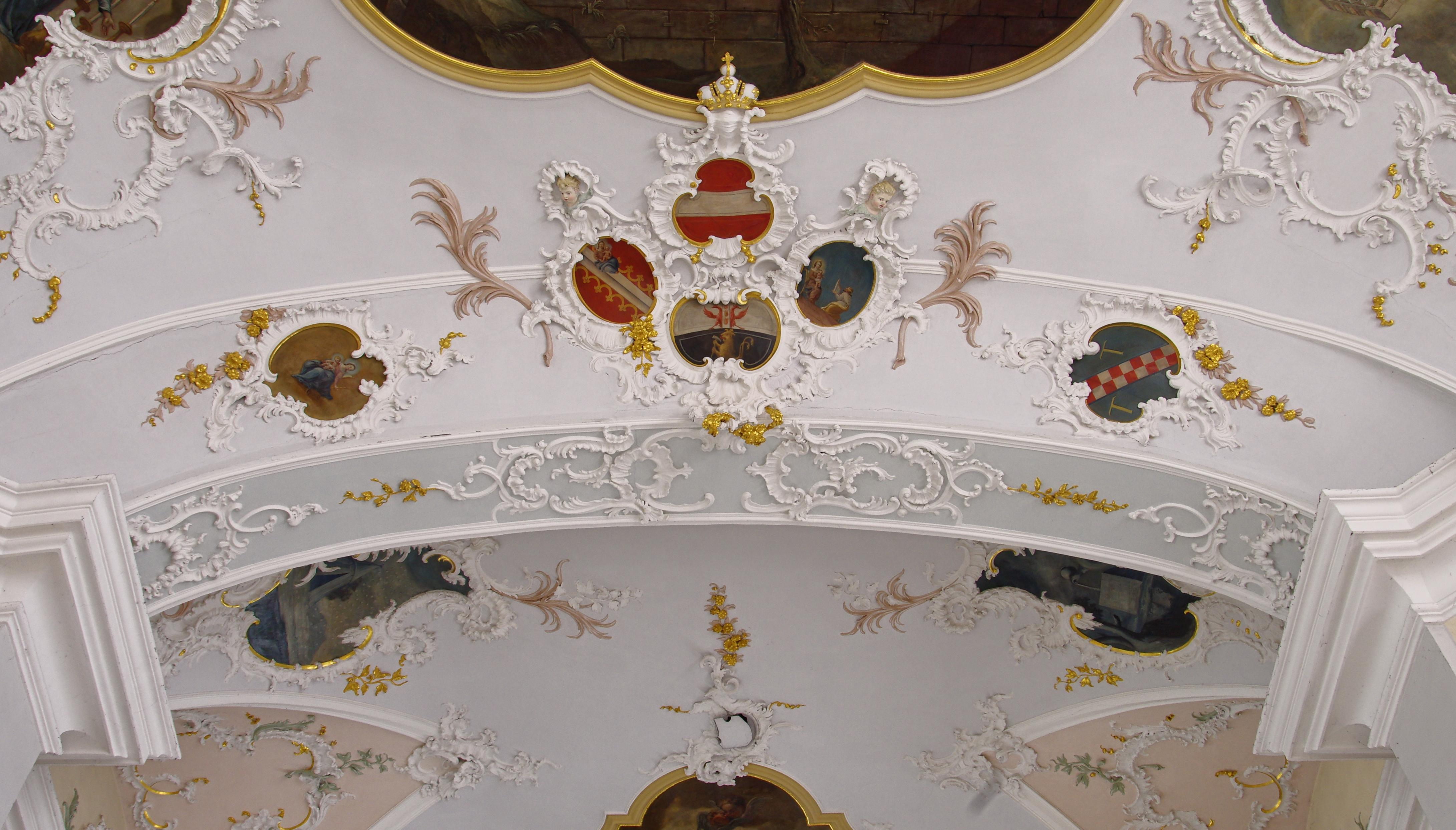 Bilder aus der katholischen Kirche St. Alexius in Herbolzheim